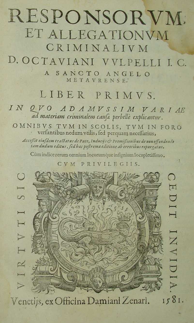 Responsorum et allegationum criminalium, Ottaviano Volpelli, Venetijs : ex officina Damiani Zenari, 1581